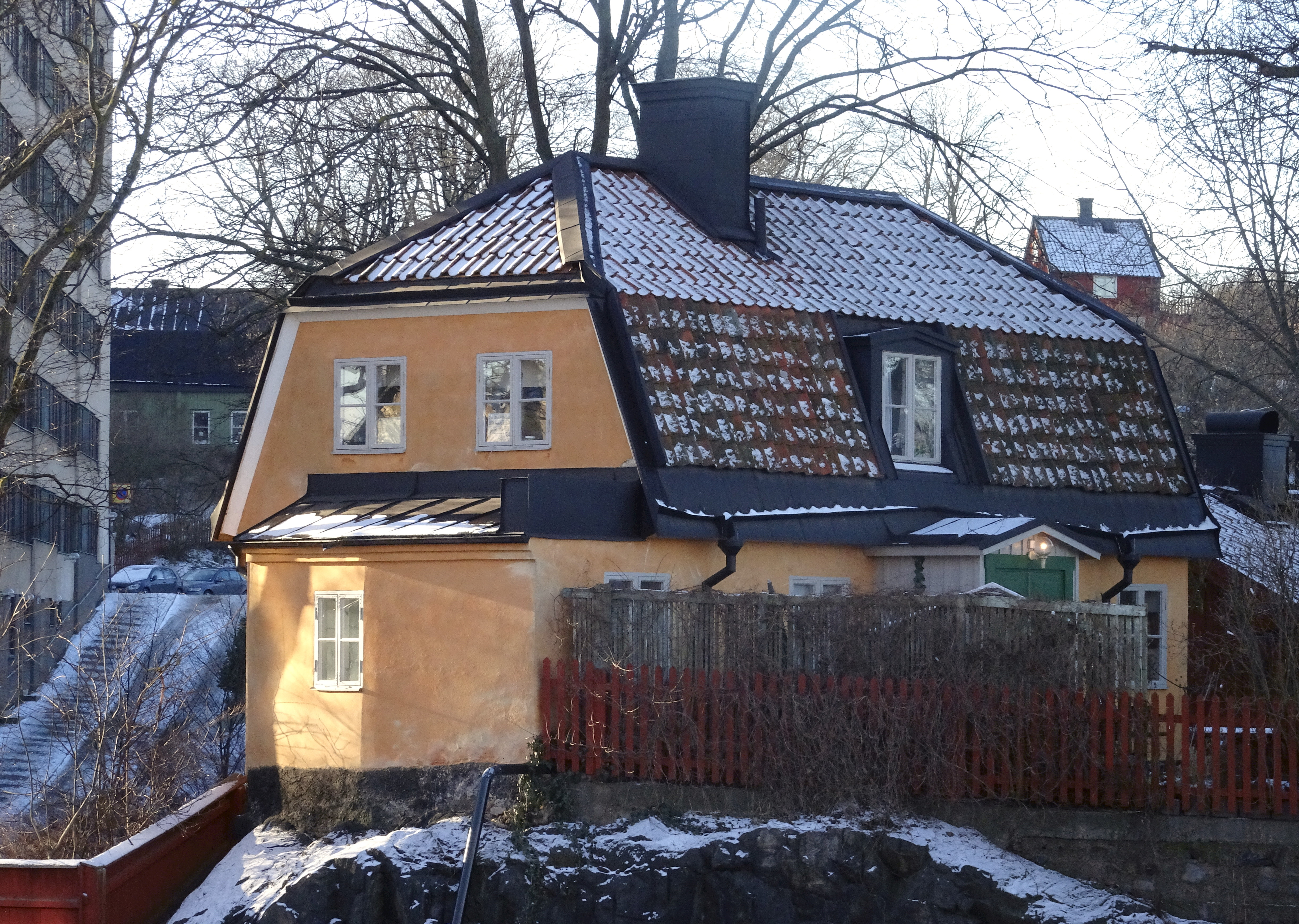 Stenhuset på Ludvigsbergsgatan 10